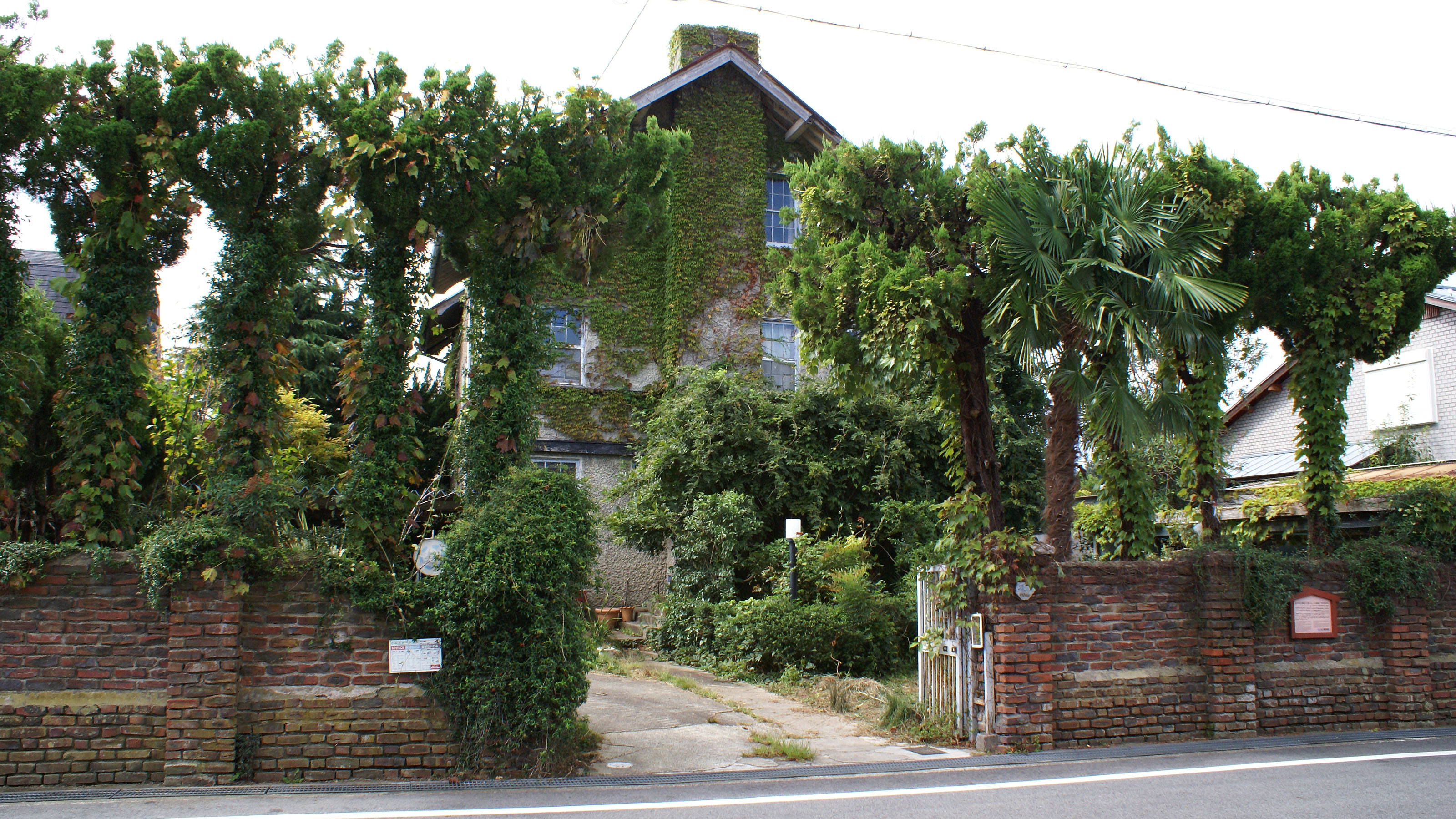 Ikeda-cho in Omihachiman, Shiga, Japan